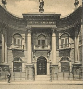 Templo de la Gran logia de la Argentina de libres y aceptados masones, en Buenos Aires. Funciona en el Barrio de San Nicolás, Perón 1242, en el antiguo Palacio Cangallo.